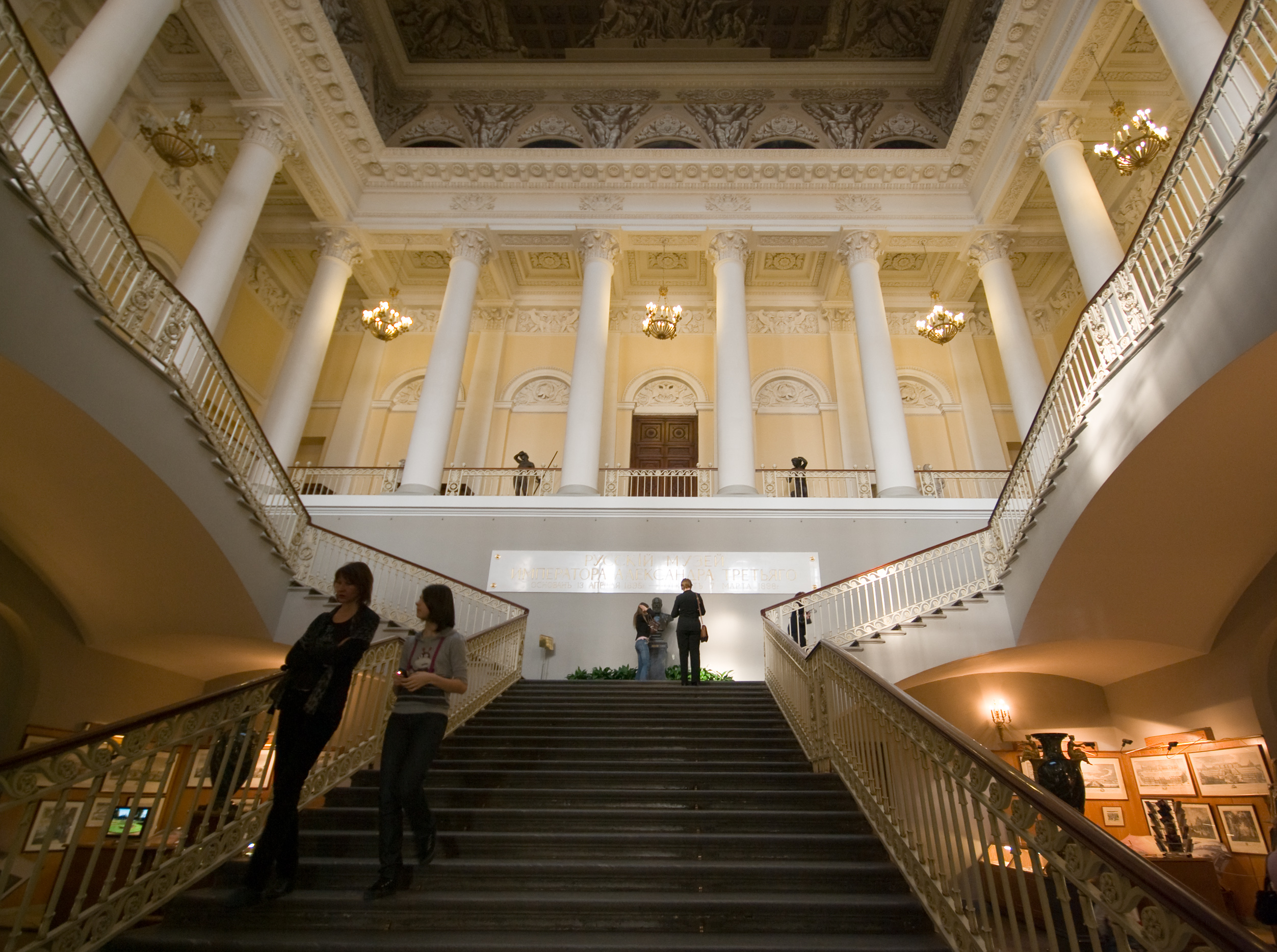 Парадная лестница Михайловского дворца (Русского музея).